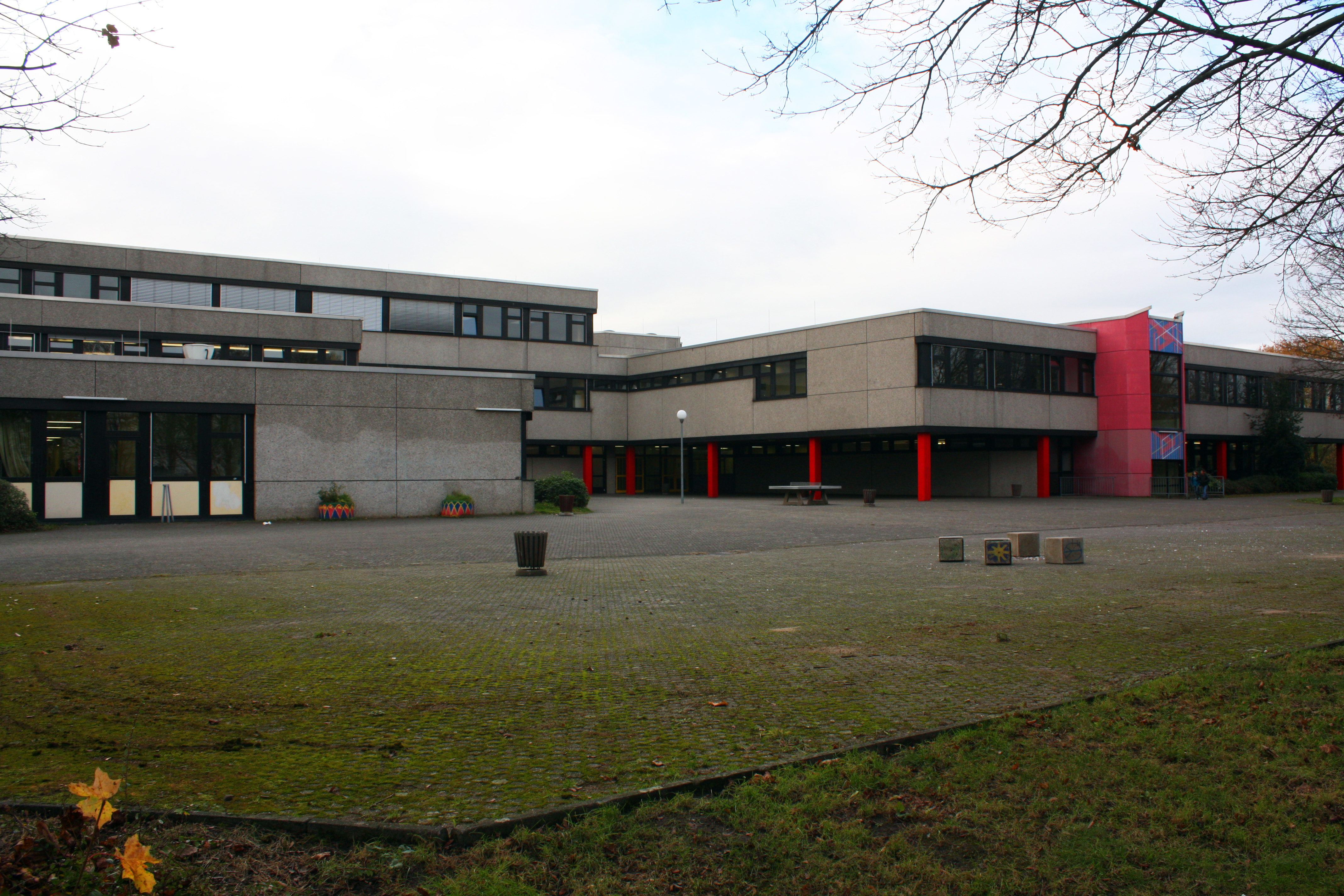 Albert-Schweitzer-Gymnasium Hürth, Haupteingang